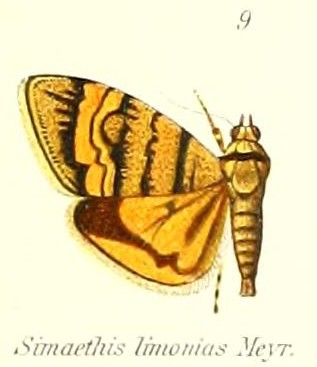 Choreutis limonias